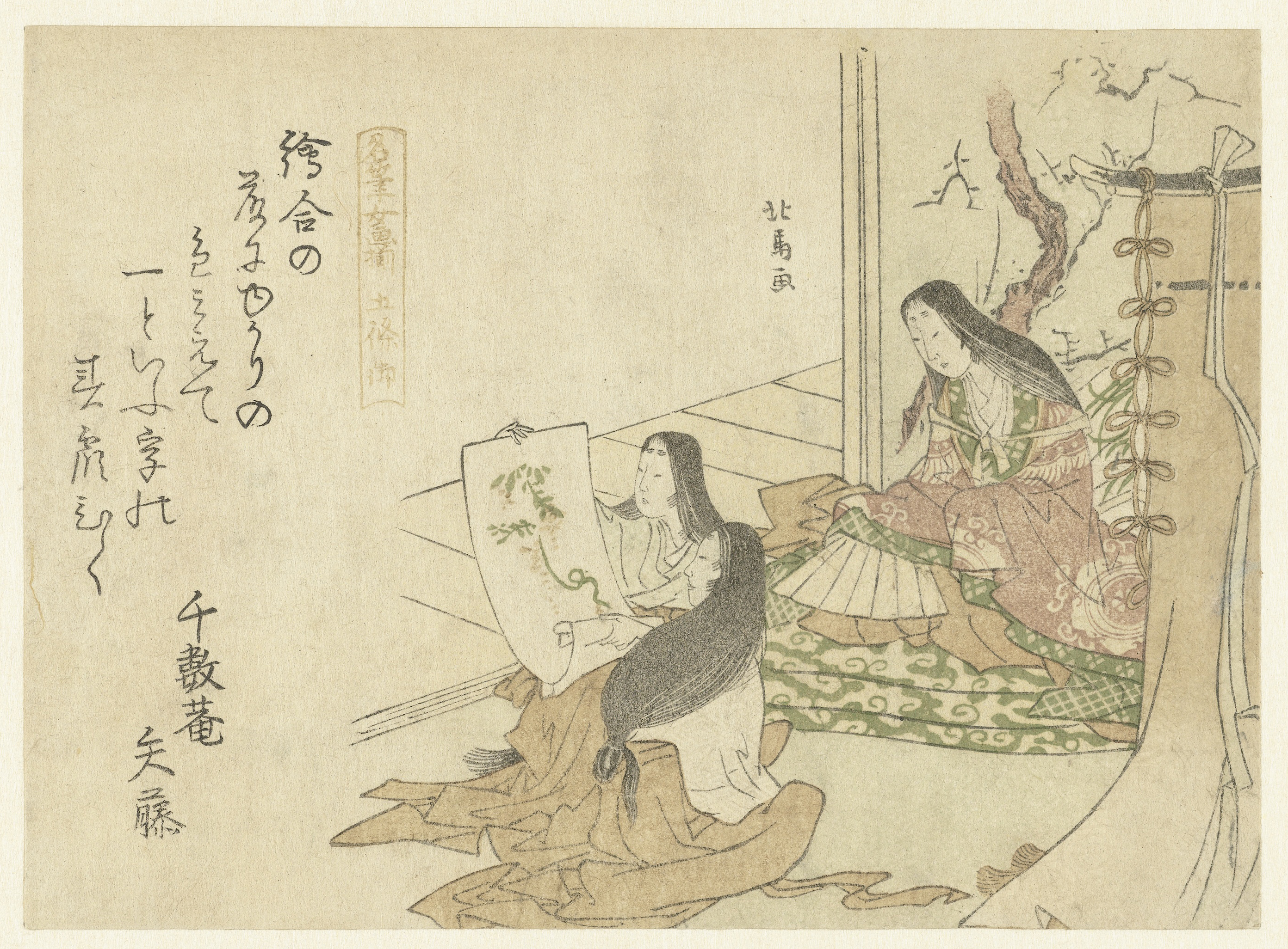 Drie zittende hofdames bij een windscherm, terwijl één een uitgerold makimono ophoudt. Fujiwara no Junshi (809-71), ook bekend als Gojô nyôgo, was de vrouw van de keizer Ninmyô (regeerde 833-50). Met één gedicht. Label Line: mentioned on object Teisai Hokuba (ca. 1771 - 1844), ca. 1800 - ca. 1805, kleurenhoutsnede; blinddruk; lijnblok in zwart met kleurblokken Collection: prenten; Japan (collectie)